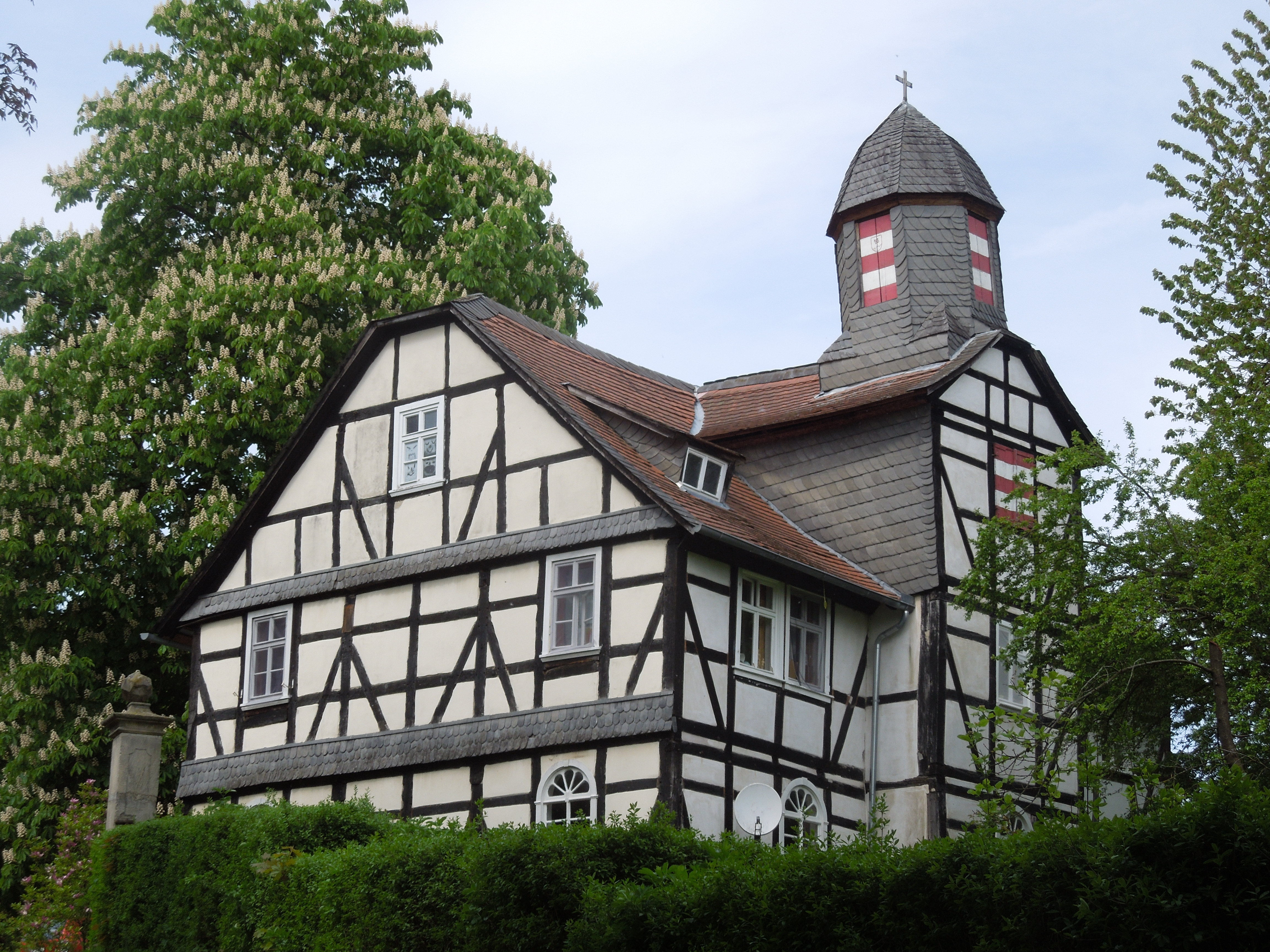 Ehemalige Kirche (mit Försterwohnung im Obergeschoss) in Betzigerode; erbaut 1773, anlässlich seiner Hochzeit, von Ernst Ludwig von Heßberg (1737–1796)